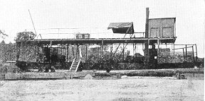 Le Stanley en 1884, navire de l'état indépendant du Congo.